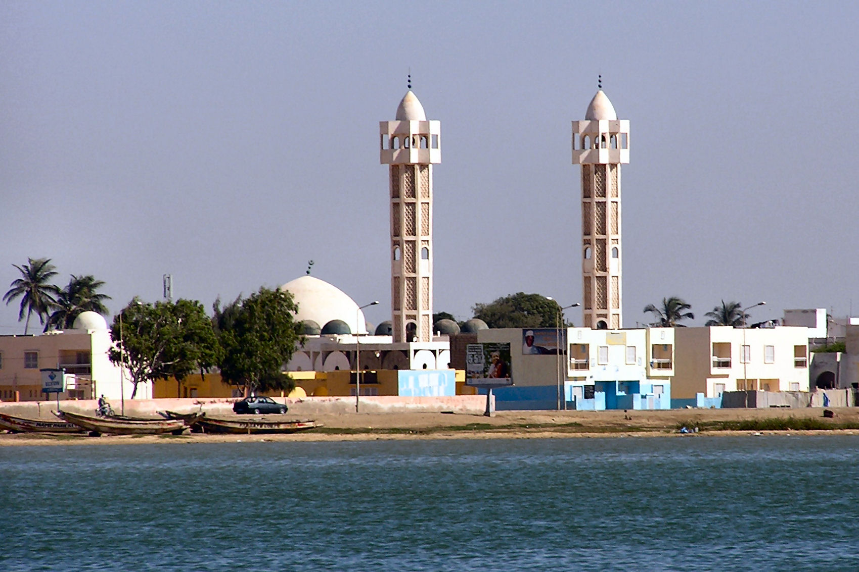 Saint Louis du Sénégal: mosquée principale